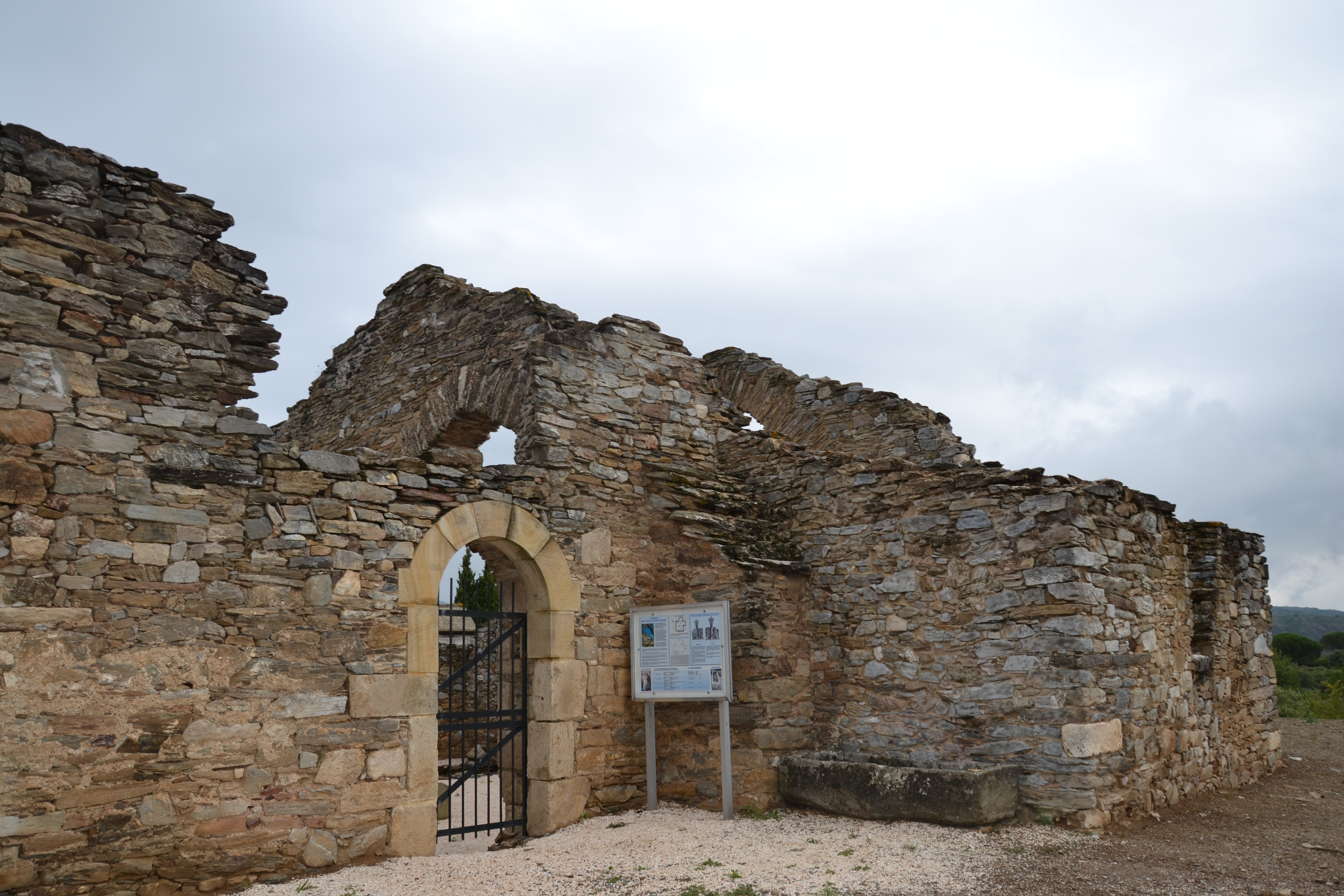 Ancienne église paroissiale des communes de Lastours, Salsigne et Villanière